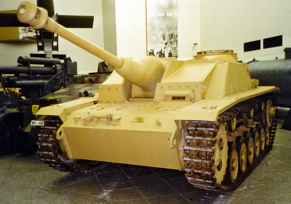 Sturmgeschütz III (Ausgestellt im Militärhistorischen Museum der Bundeswehr in Dresden)